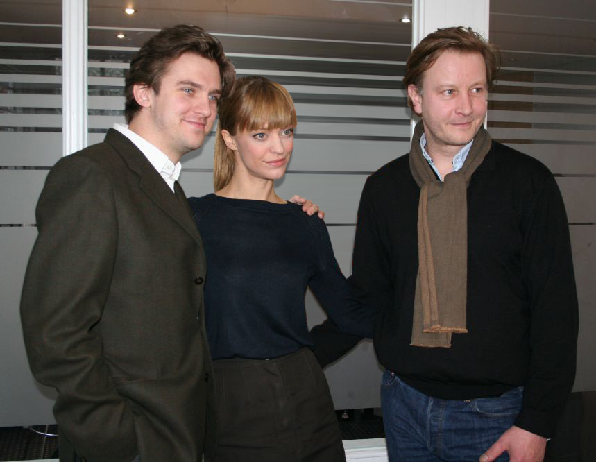 Schauspieler Dan Stevens und Heike Makatsch mit Regisseur Kai Wessel (v.l.) bei der Vorstellung ihres Films Hilde im Mannheimer Cineplex